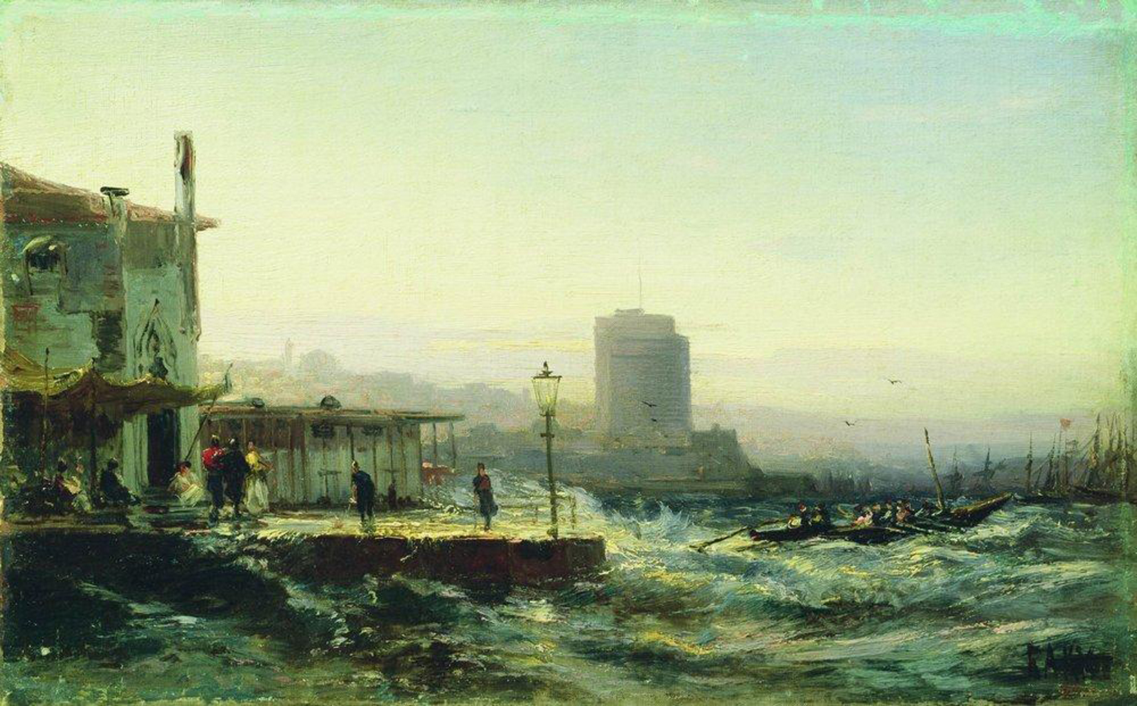 Baku embankment